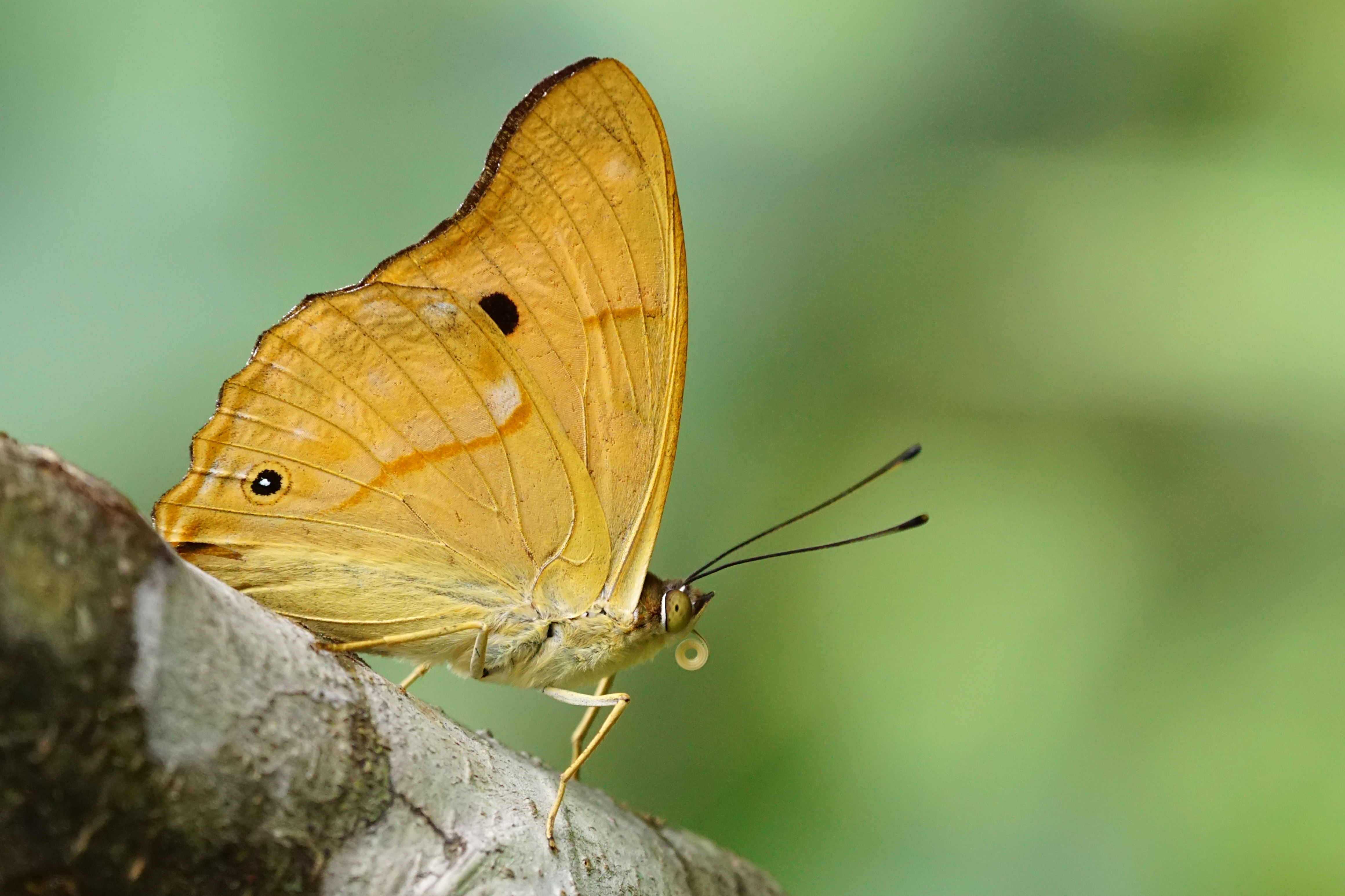 金鎧蛺蝶 Chitoria chrysolora 雄